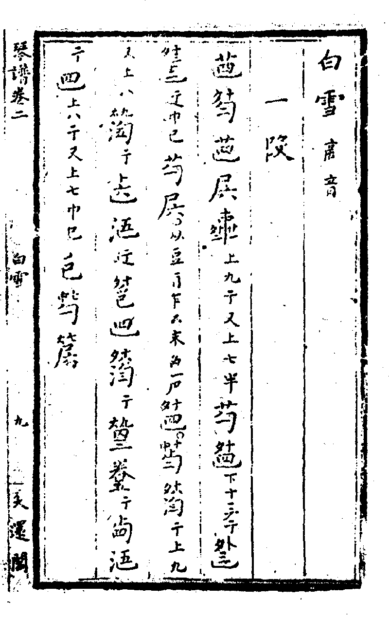 中文（香港）: 大還閣琴譜中的《白雪》譜第一頁